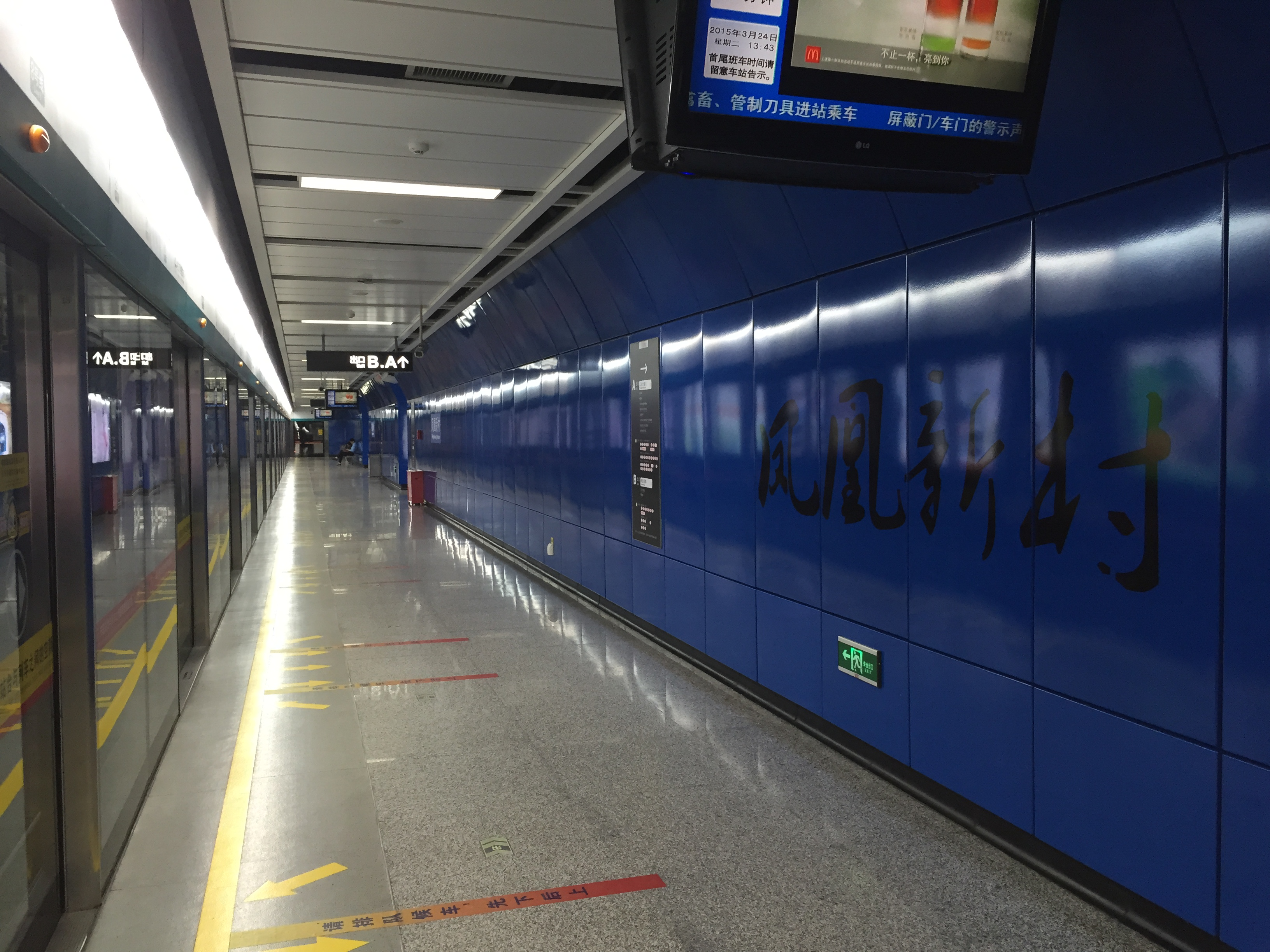 广州地铁凤凰新村站